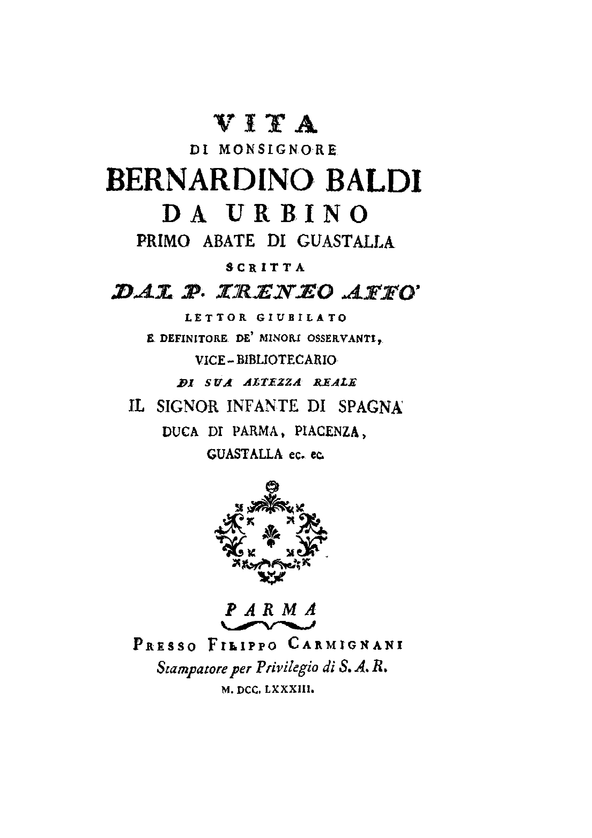 Vita di monsignore Bernardino Baldi da Urbino primo abate di Guastalla scritta dal p. Ireneo Affò lettor giubilato e definitore de' minori osservanti, vice-bibliotecario di sua altezza reale … duca di Parma …. - Parma : presso Filippo Carmignani stampatore per privilegio di S.A.R., 1783. - XVI, 232 p., [1] c. di tav. : ritratto calcografico ; 4º. - Ritratto di Bernardino Baldi inciso da Sebastiano Zamboni, su disegno di Gaetano Bombardi .